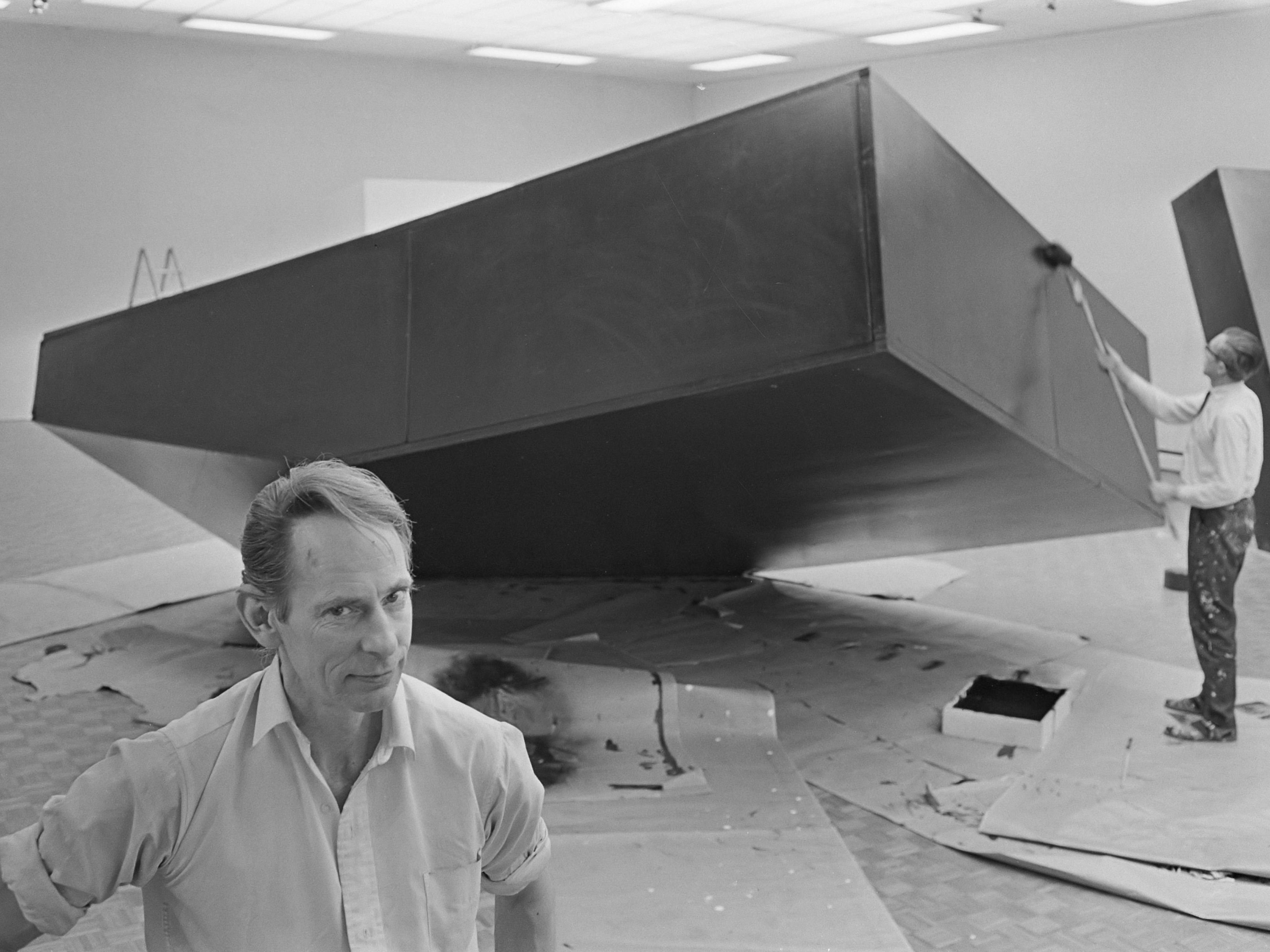 Minimal Art in Haags Gemeentelijk Museum. Kunstwerk van Ronald Bladen 20 maart 1968